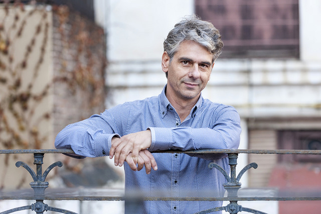 Autor de La vida sense la Sara Amat